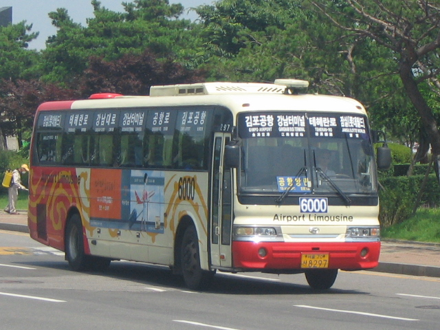 공항리무진 6000번 버스